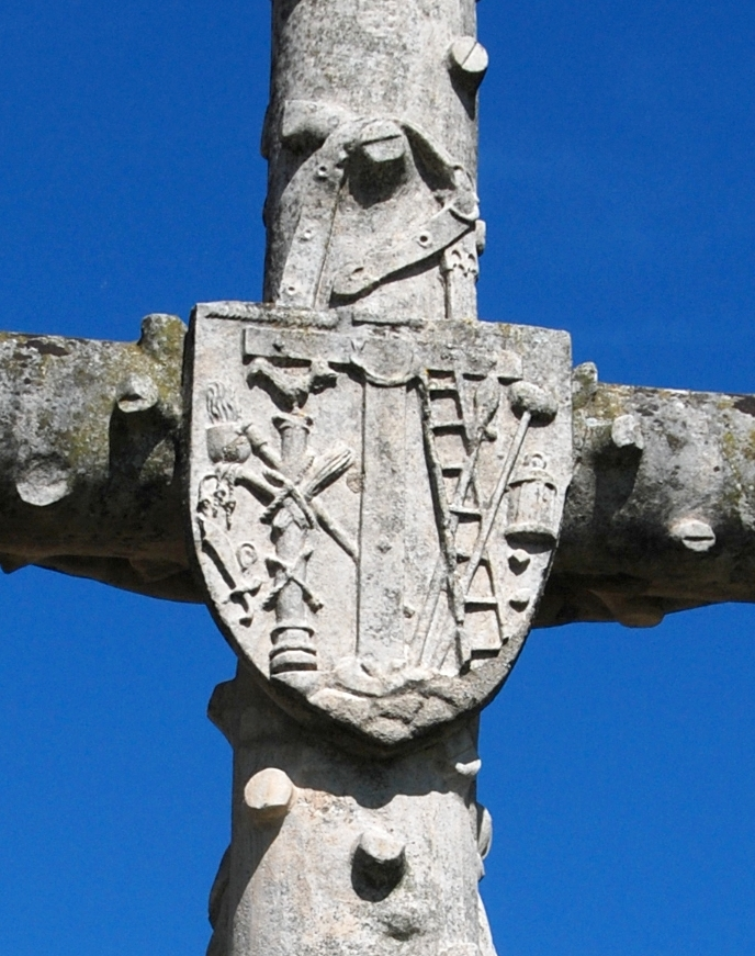 détail du dos de la croix